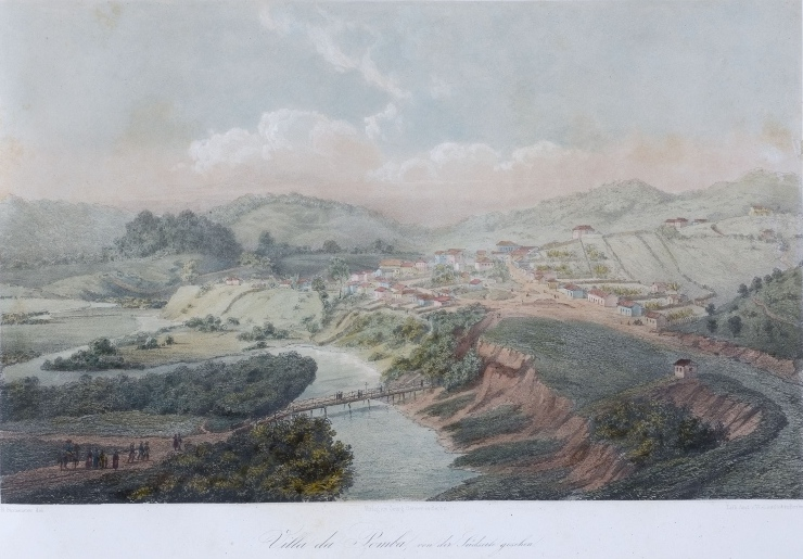 Litografia de Loeillot (1840-1876), com vista da Vila da Pomba, atual cidade de Rio Pomba, Minas Gerais, Brasil.